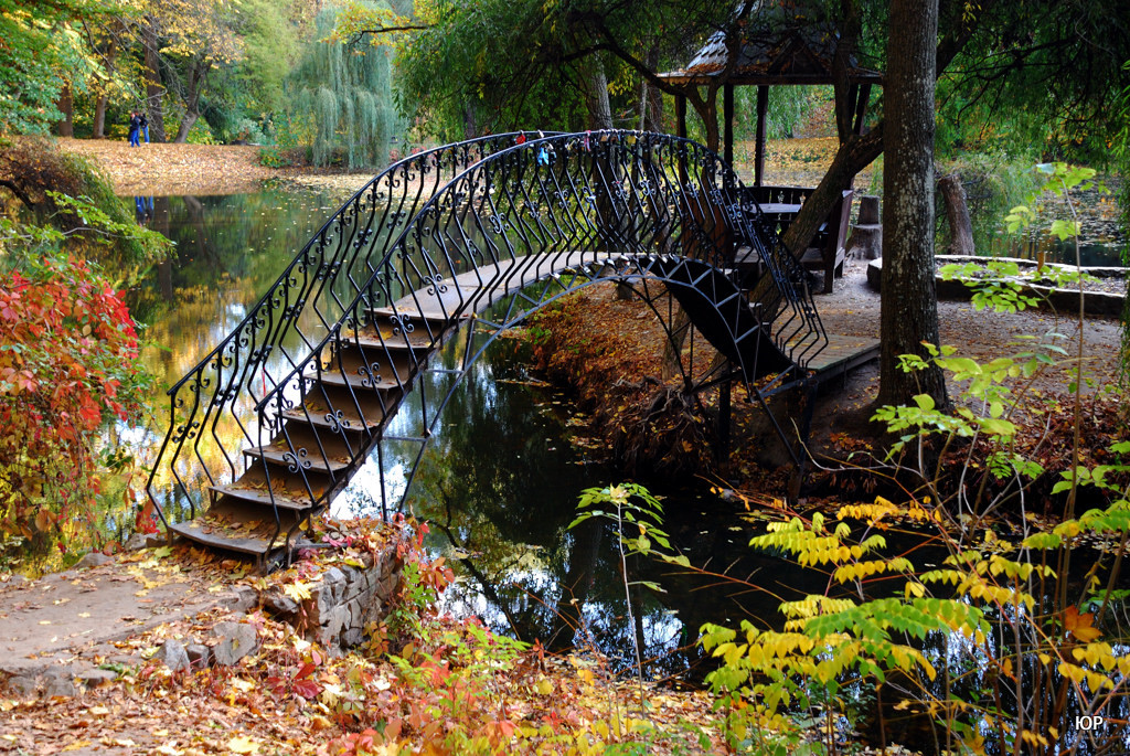 «Краснокутський», Краснокутський район смт. Краснокутськ